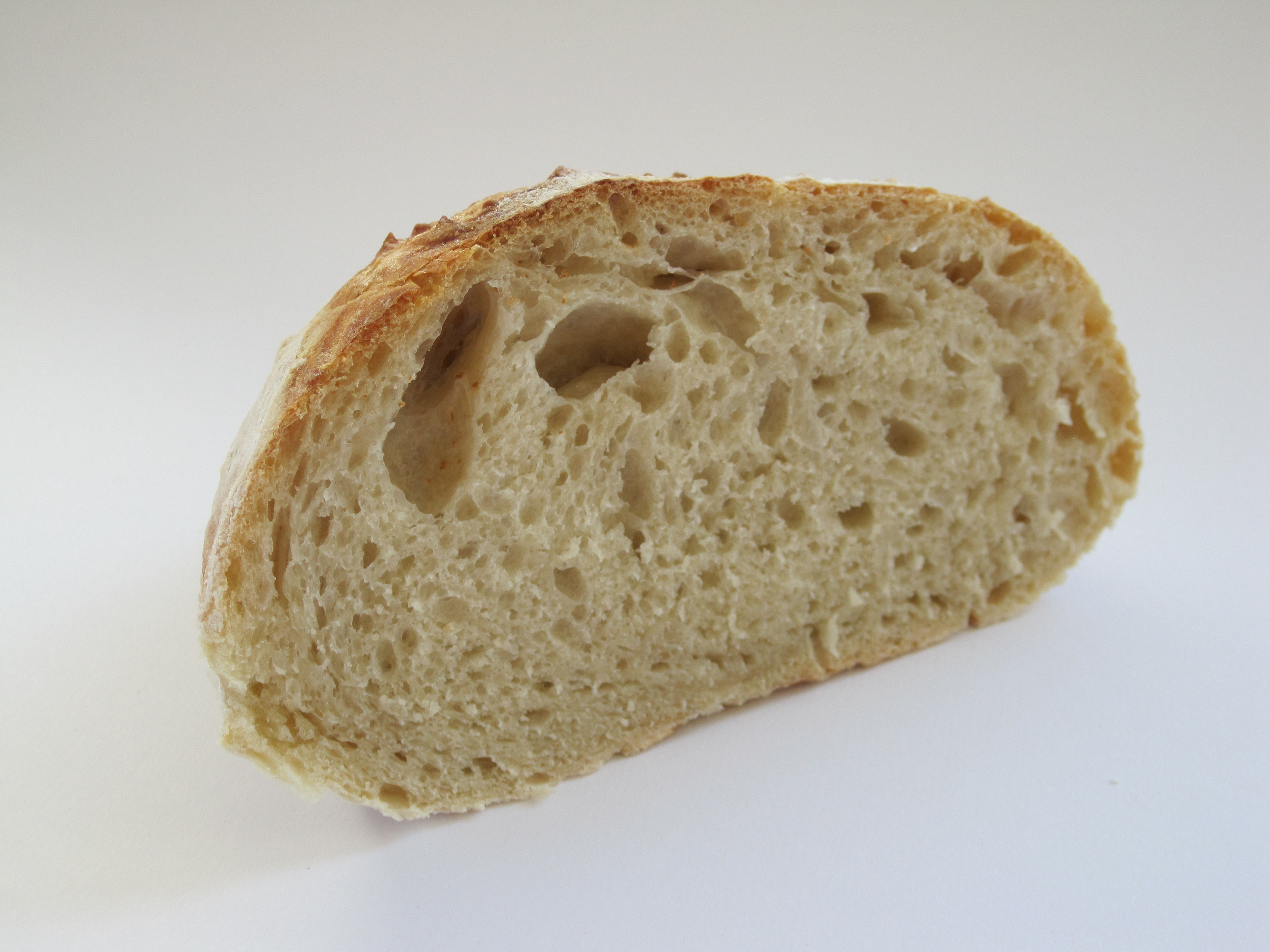 Selbst gebackenes Brot aus Dinkelmehl